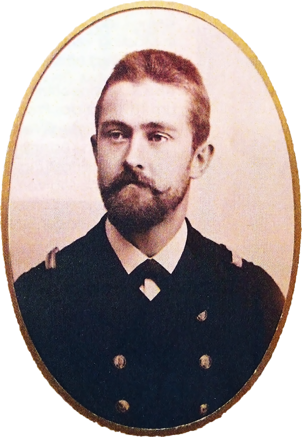 Theodor Scheimpflug (1865-1911), Pionier der Luftbildvermessung